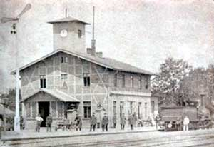 Bahnhof Wolmirstedt an der Magdeburg-Wittenbergeschen Eisenbahn um 1880